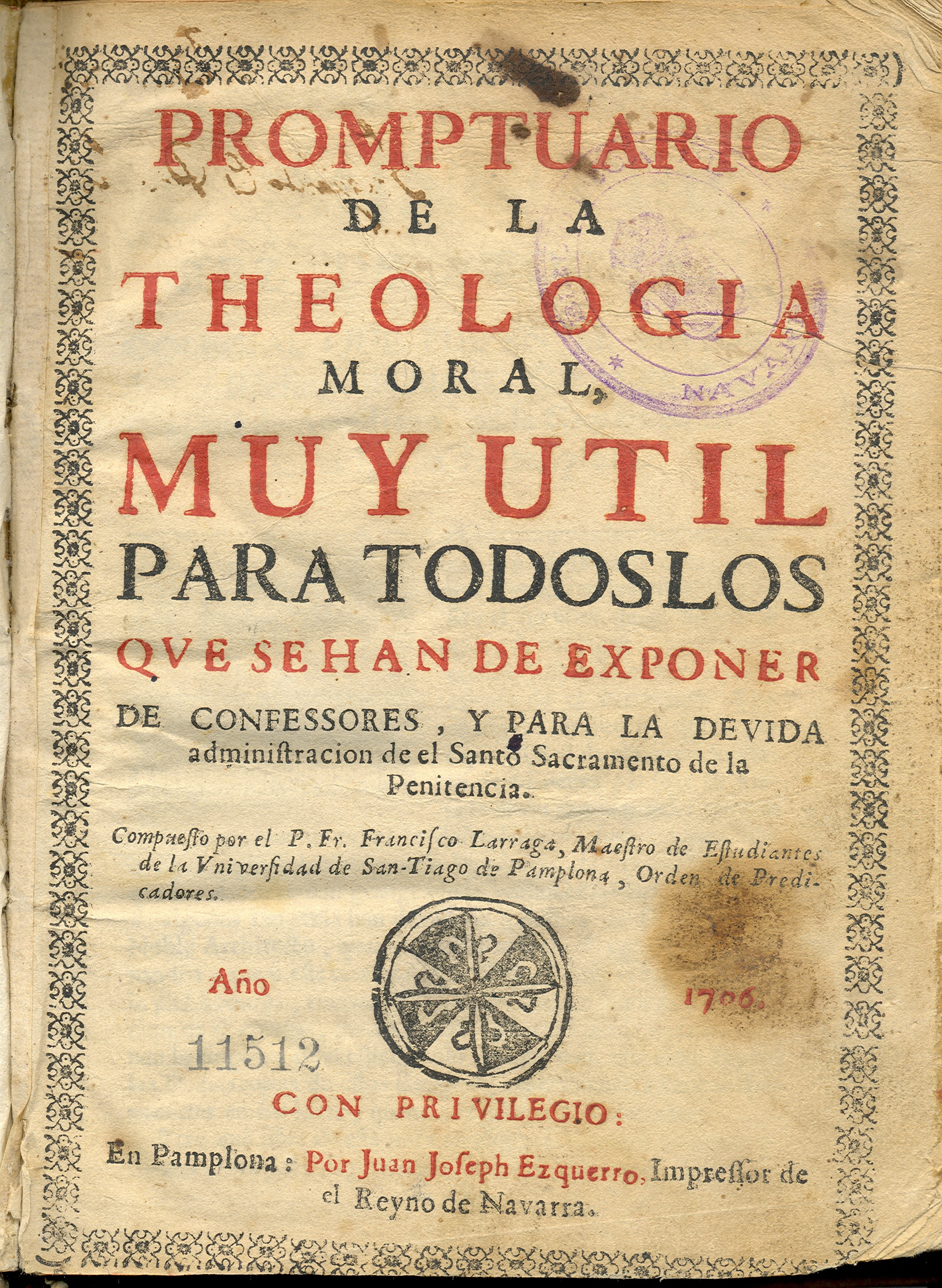 Larraga, Prompturario de la Teología Moral, Pamplona, Juan José Ezquerro, 1706